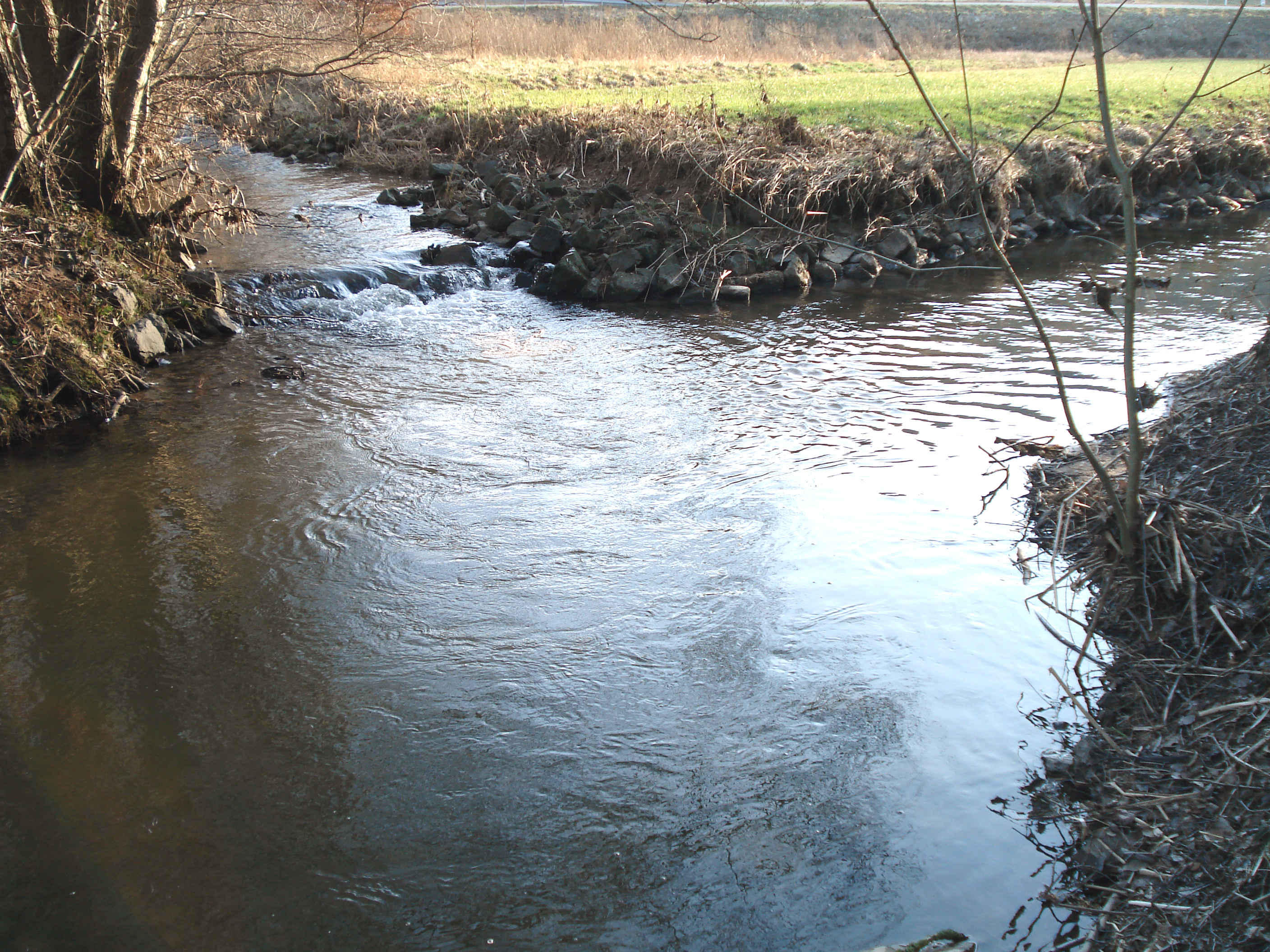 Zusammenfluss von Osterbach (hinten links) und Mergbach (hinten rechts) zur Gersprenz (vorne links)